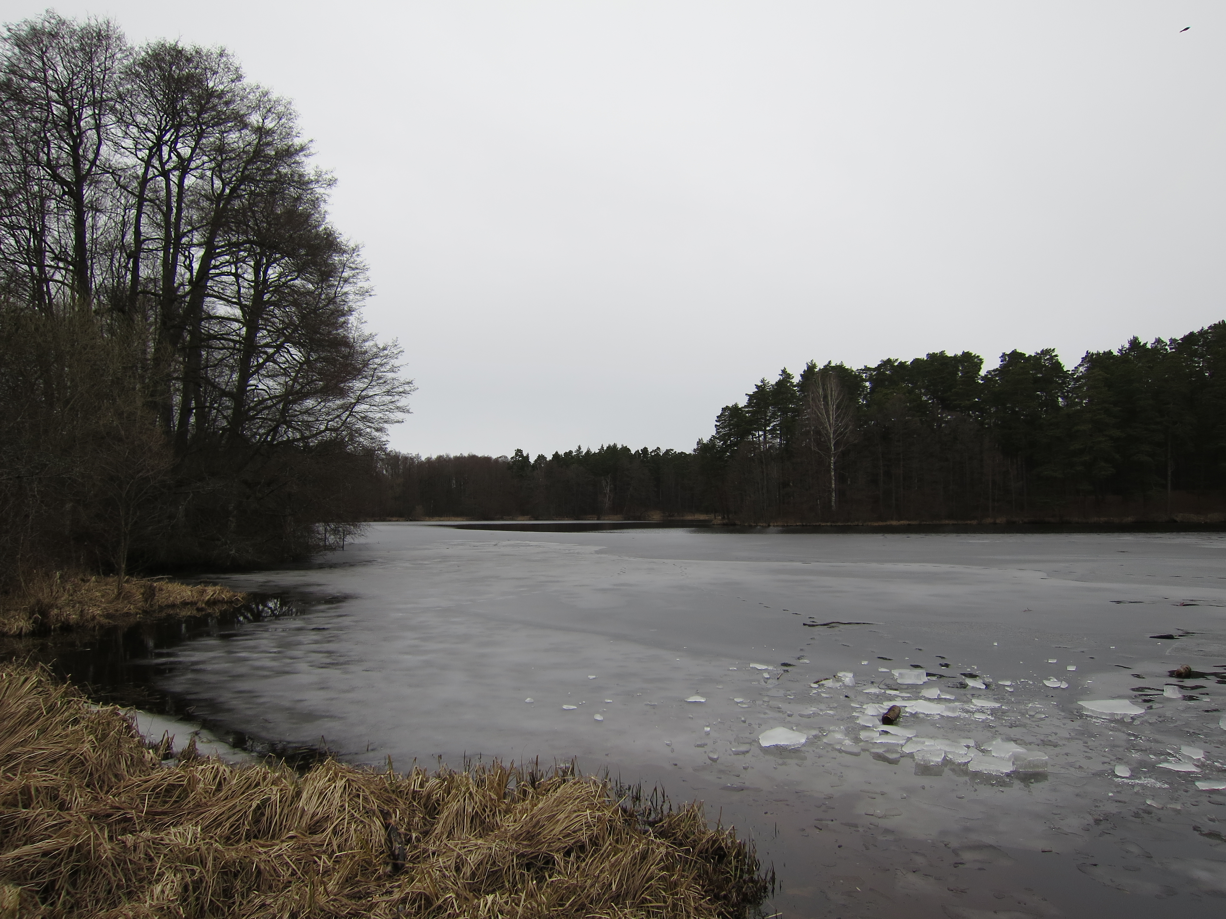 Ledus Beberbeķu ezerā.